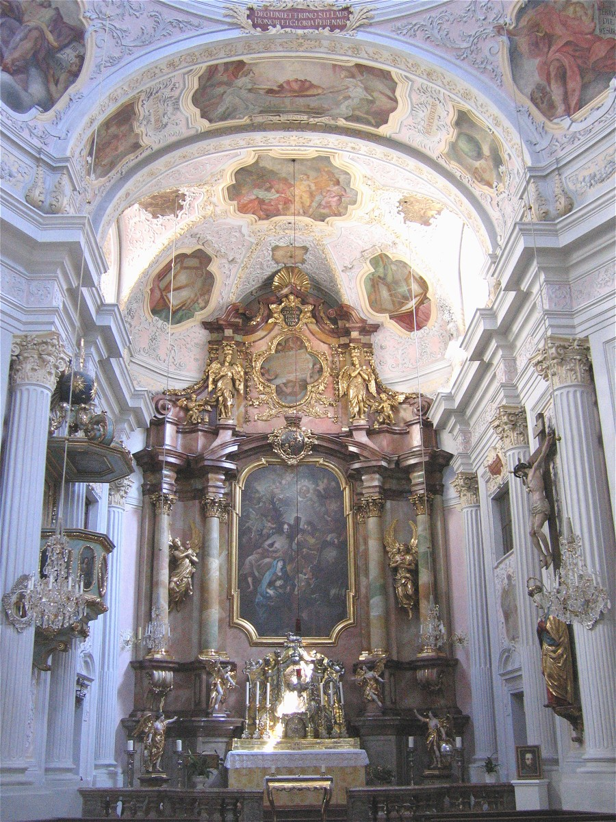 Dreifaltigkeitskirche in München, Innenraum